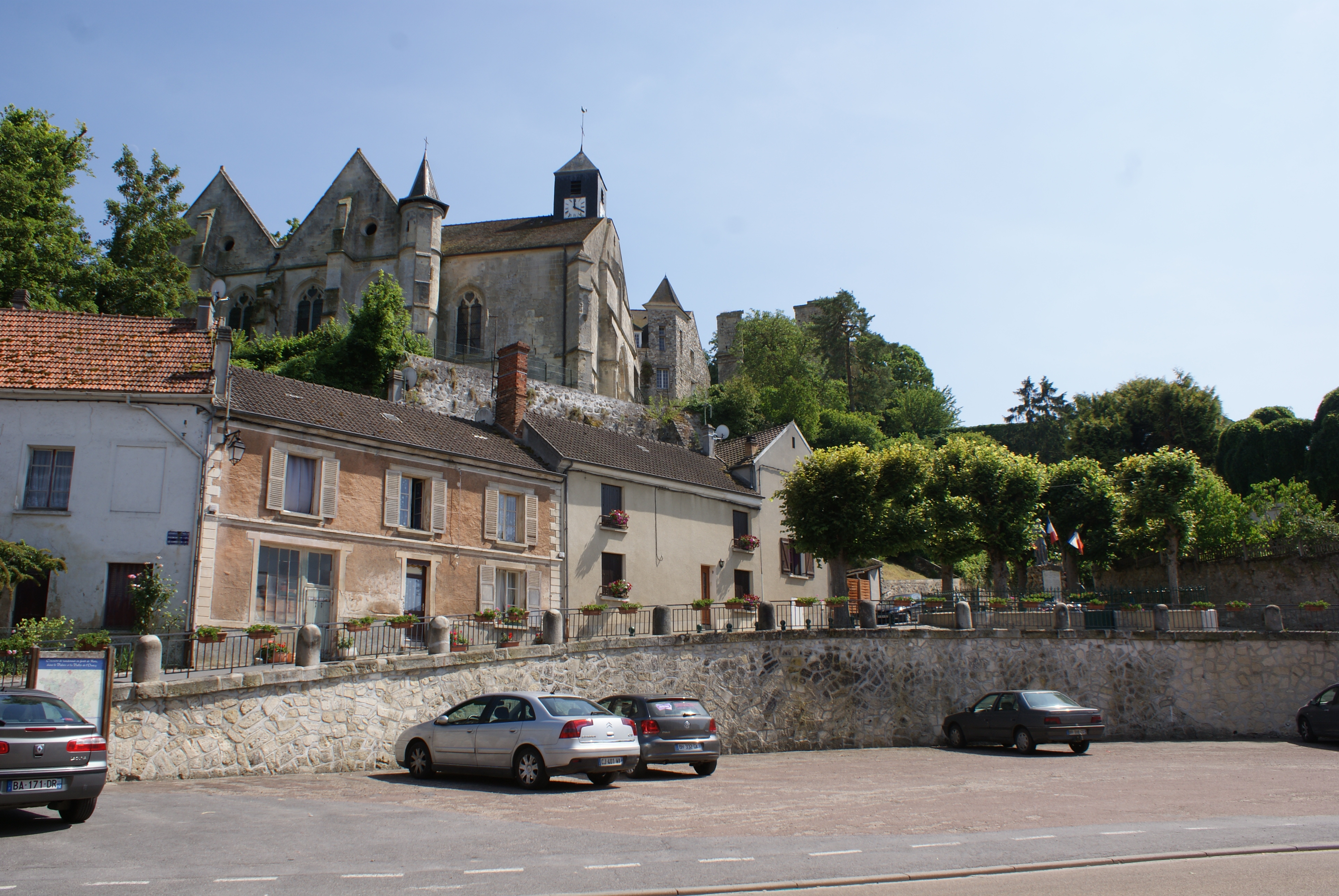 Place de la Poterne à Gandelu surplombée par le monument aux morts. En arrière plan l'église Saint Remy et les vestige du château du XIIe siècle